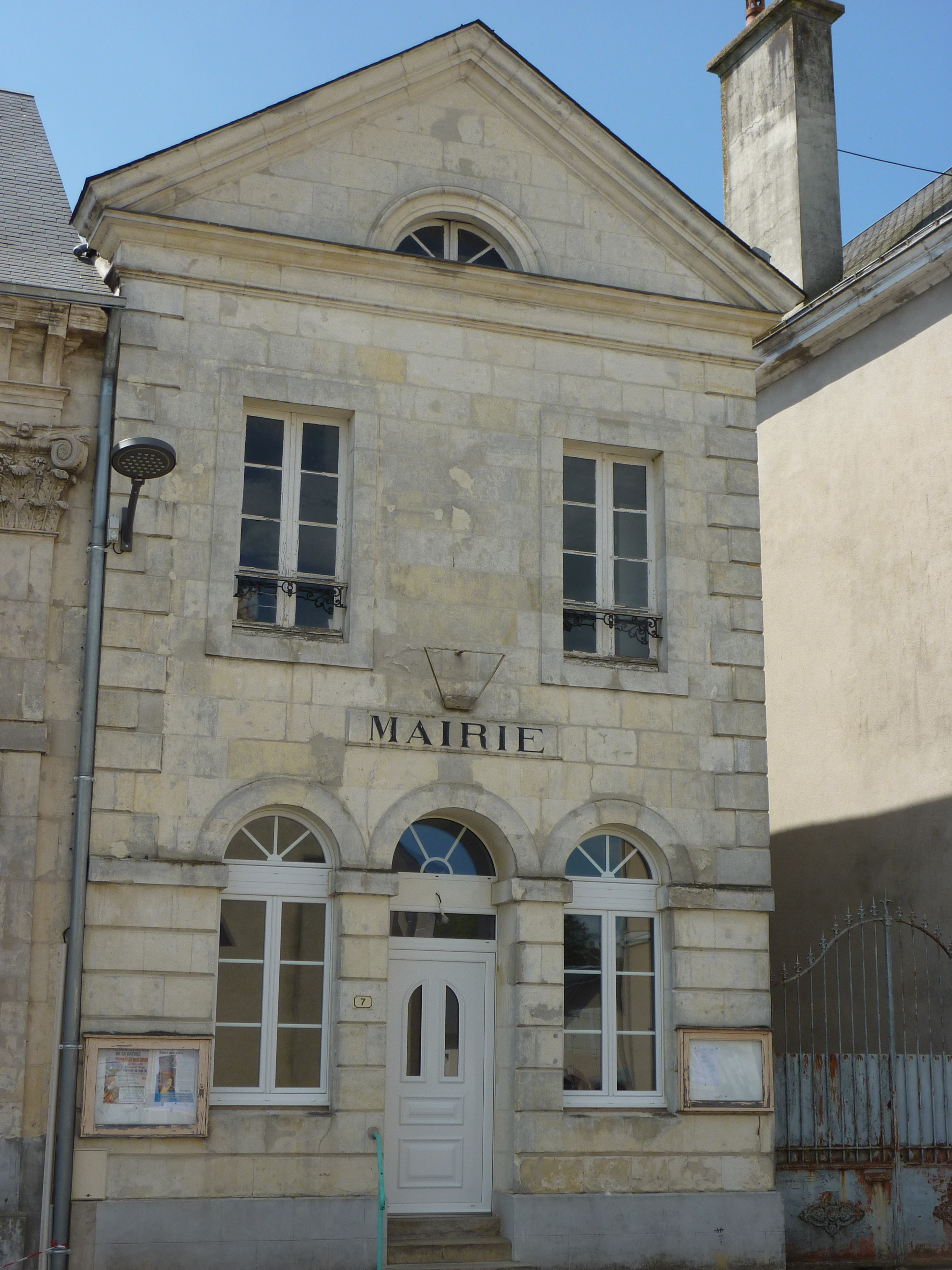 Marigné-Laillé dans la Sarthe.